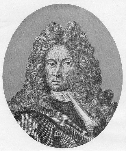 Johann Albert Fabricius (1668–1736), deutscher Philologe. Anonymer Stich (aus Schröcks Abbild. berühmter Gelehrter. Lpz. 1766, Bd. I, Tafel 30)